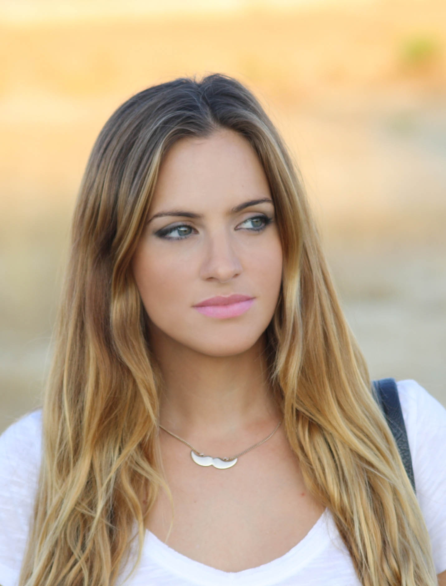 Tutti Márquez Presentadora de TV